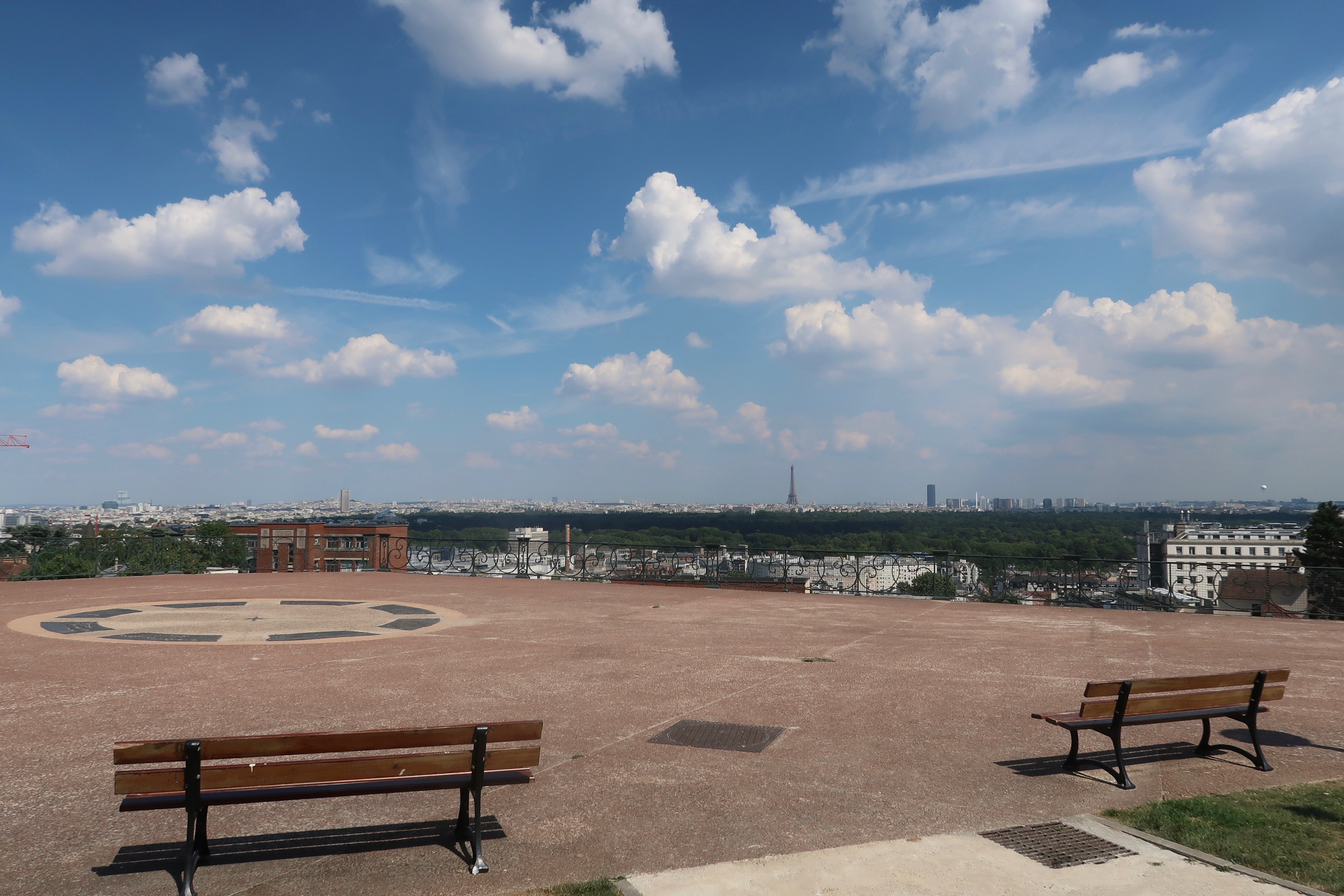 Terrasse du Fécheray à Suresnes (Hauts-de-Seine).